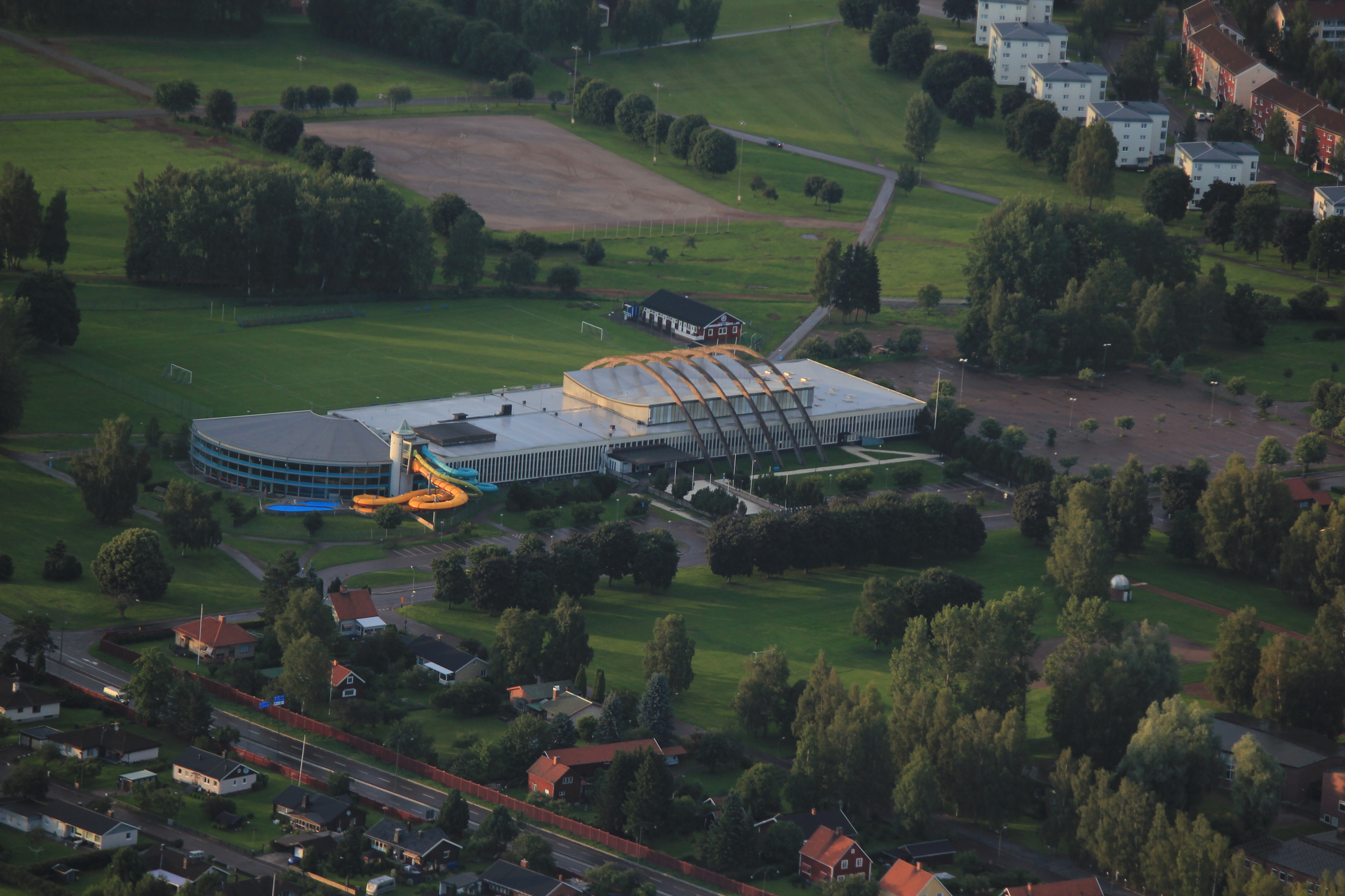 Flygfoto över Maserhallen med äventyrsbadet Aqua Nova, samt delar av Sportfältet och stadsdelen Bullermyren. Borlänge, Dalarnas län, Sverige This aerial photograph has been approved for publishing by the Swedish Armed Forces with the ID: FMTM 10 830:11043 This tag does not indicate the copyright status of the attached work. A normal copyright tag is still required. See Commons:Licensing for more information.